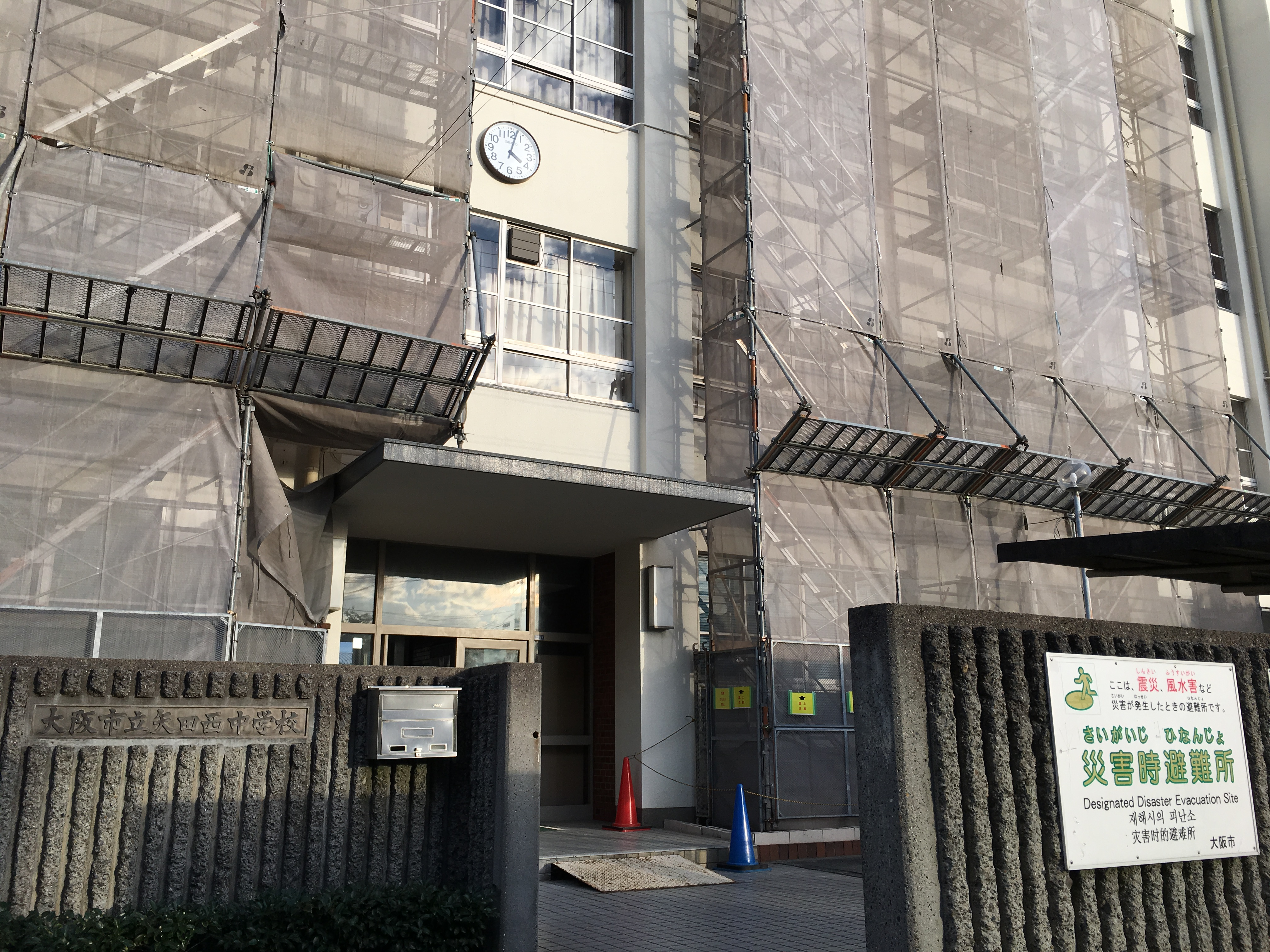 矢田西中学校